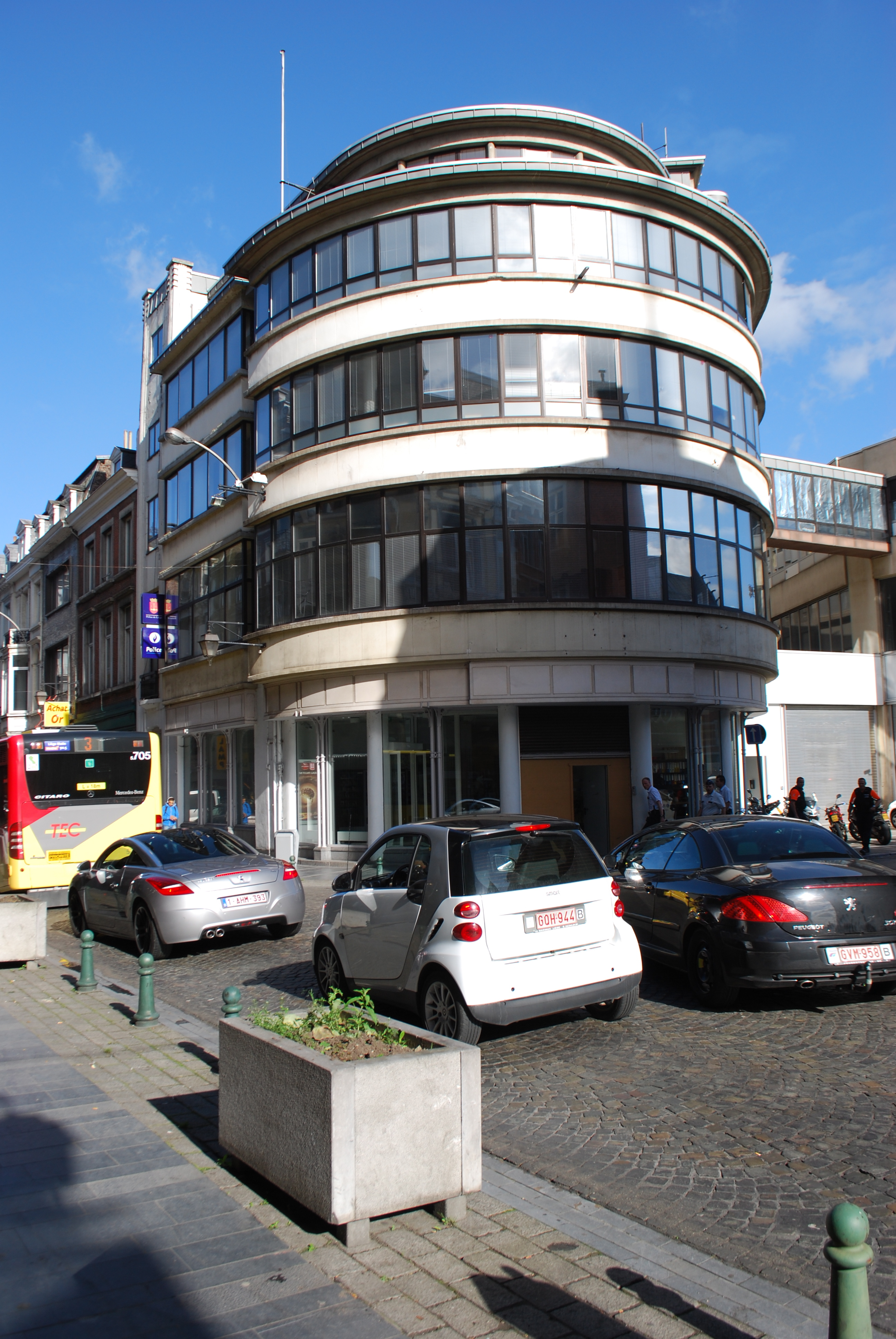 Vue du commissariat de police de la rue de la Régence à Liège, dans les anciens bâtiments du journal quotidien "La Wallonie".